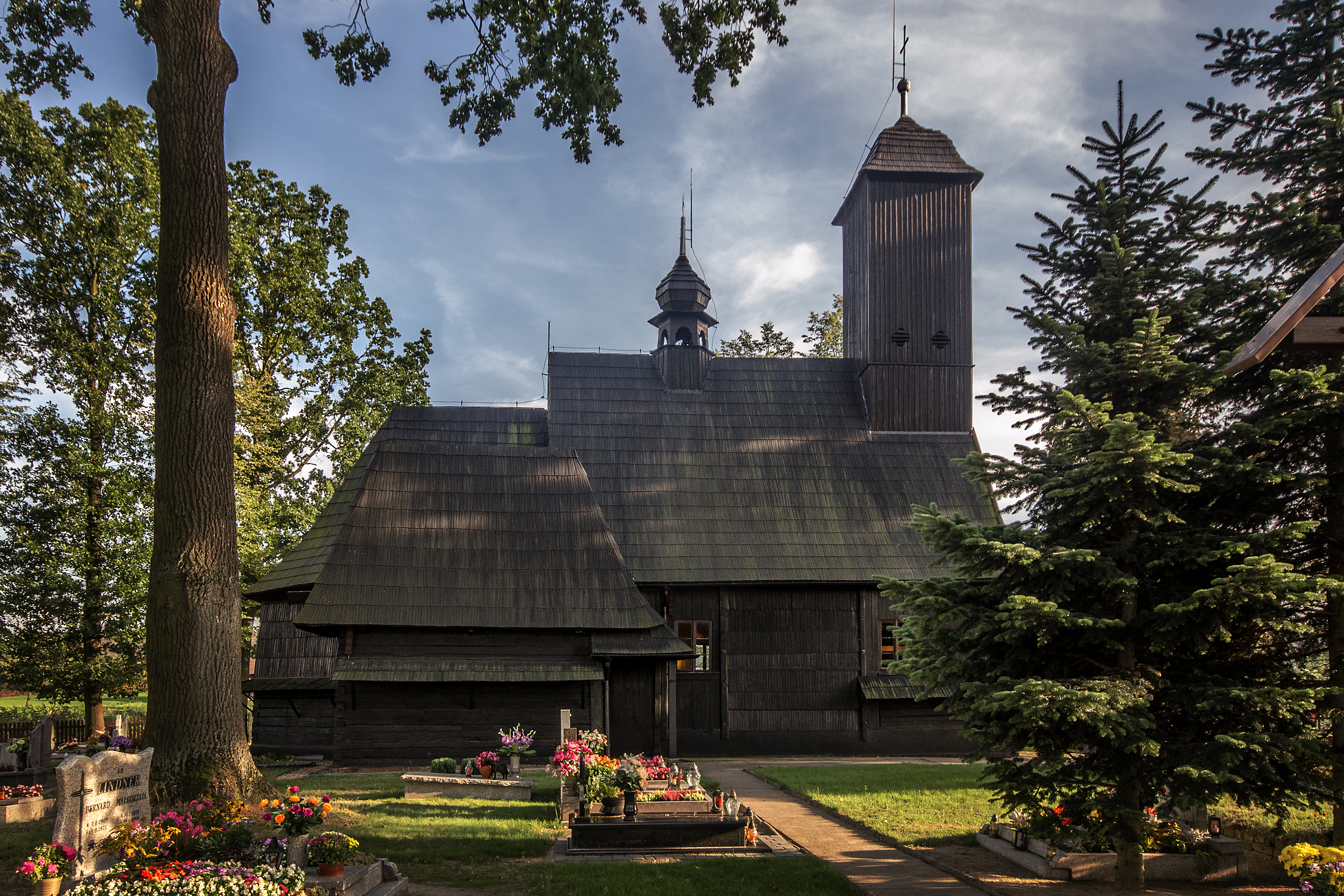 Wędrynia, kościół fil. p.w. św. Jana Chrzciciela, 1791